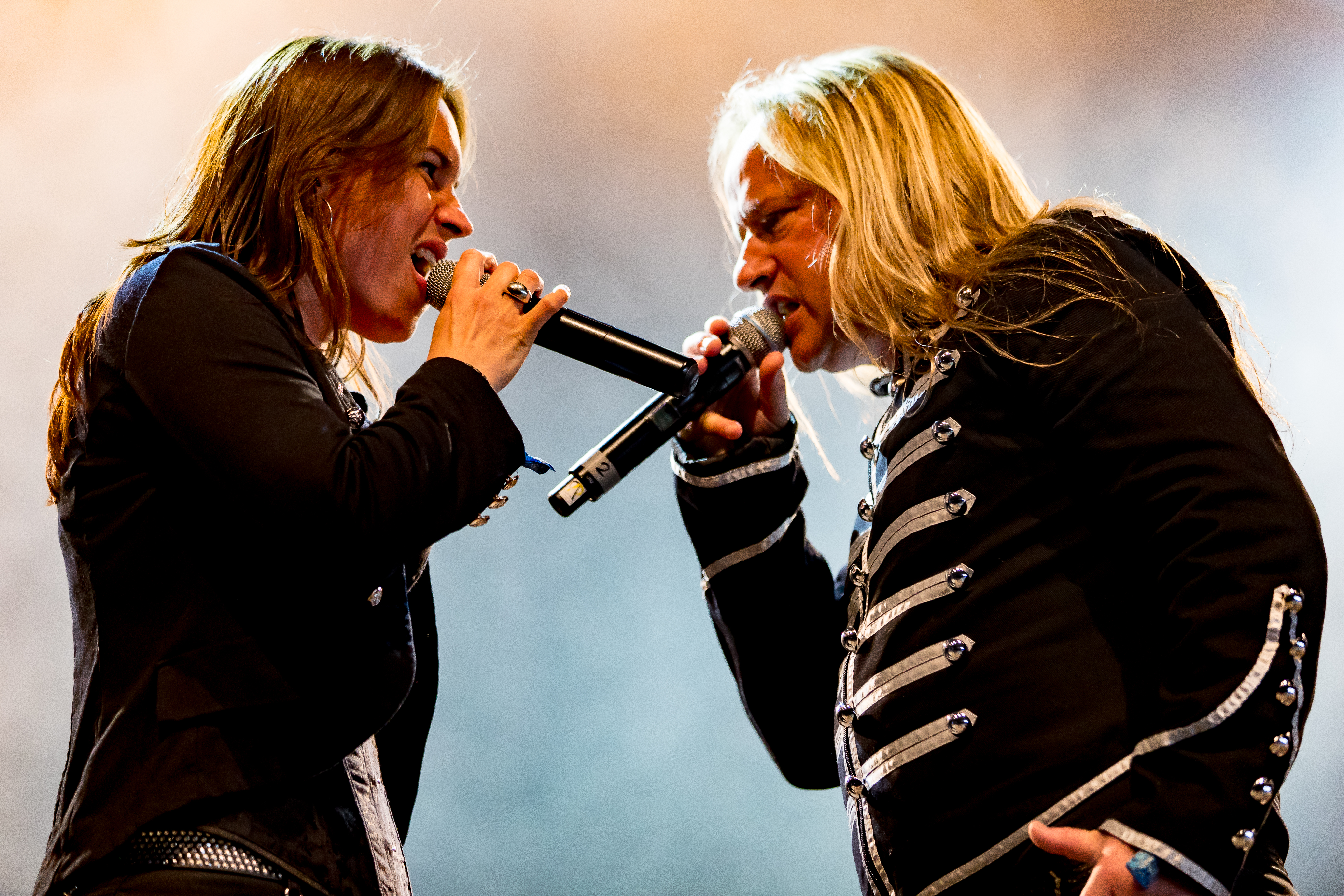 Almanac during Summer Breeze 2016 at , Dinkelsbühl, Bayern, Germany on 2016-08-17, Photo: Sven Mandel